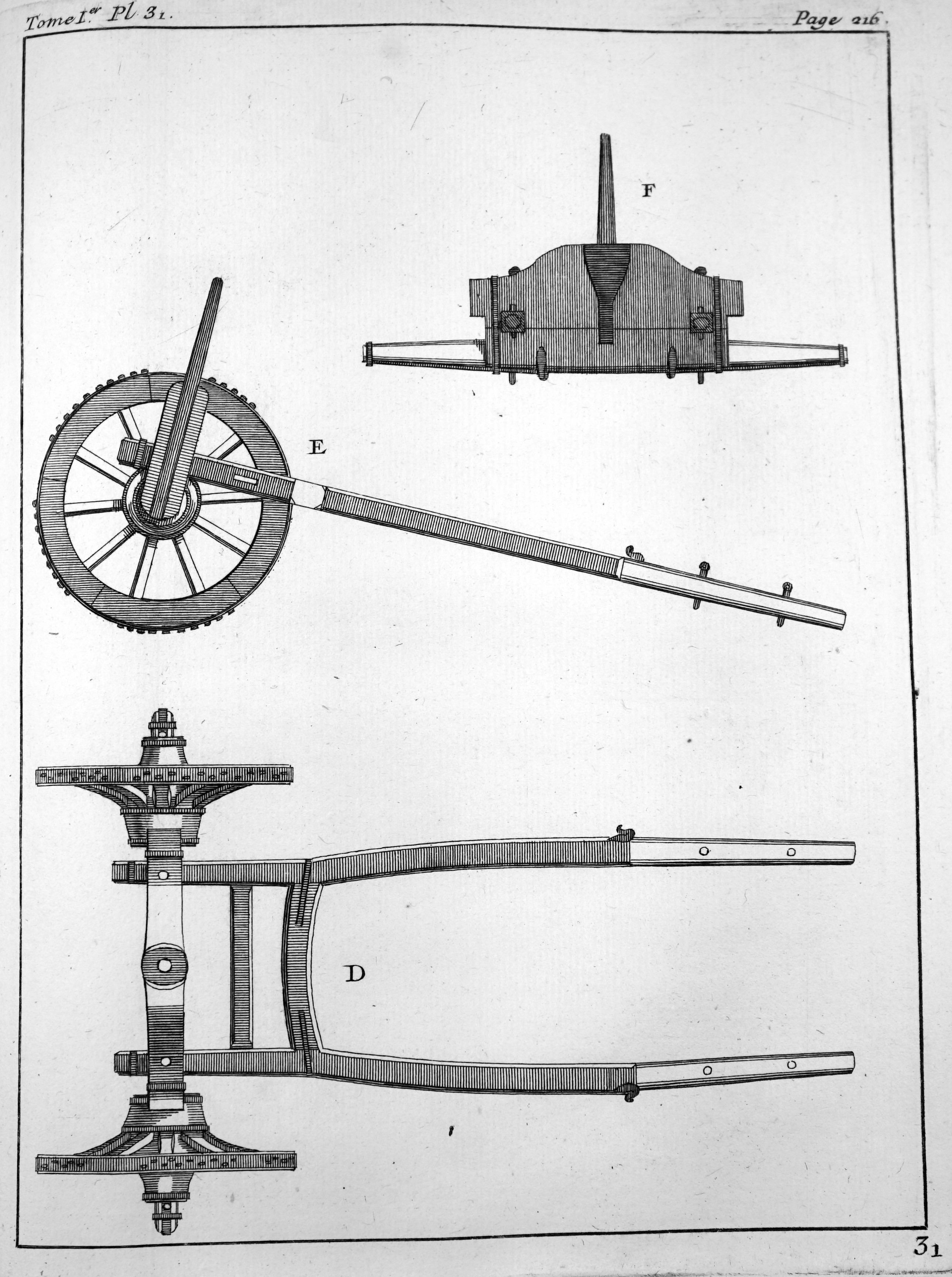 Mémoires d'artillerie, recueillis par M. Surirey de Saint Remy, exemplaire de la B.M. de Reims, troisième édition.